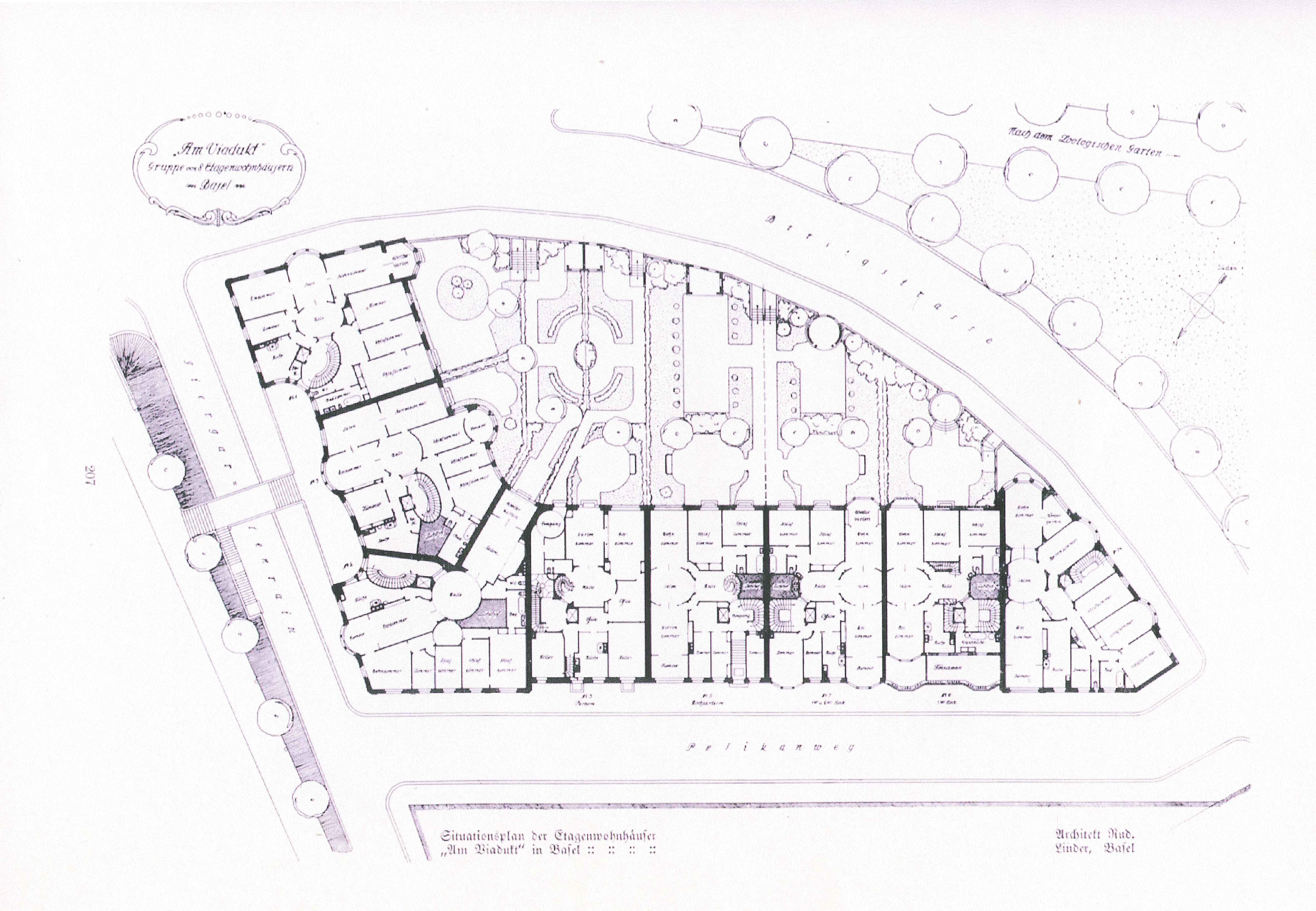 Situationsplan der Etagenwohnhäuser „Am Viadukt“ in Basel. Architekt Rudolf Linder, Basel.